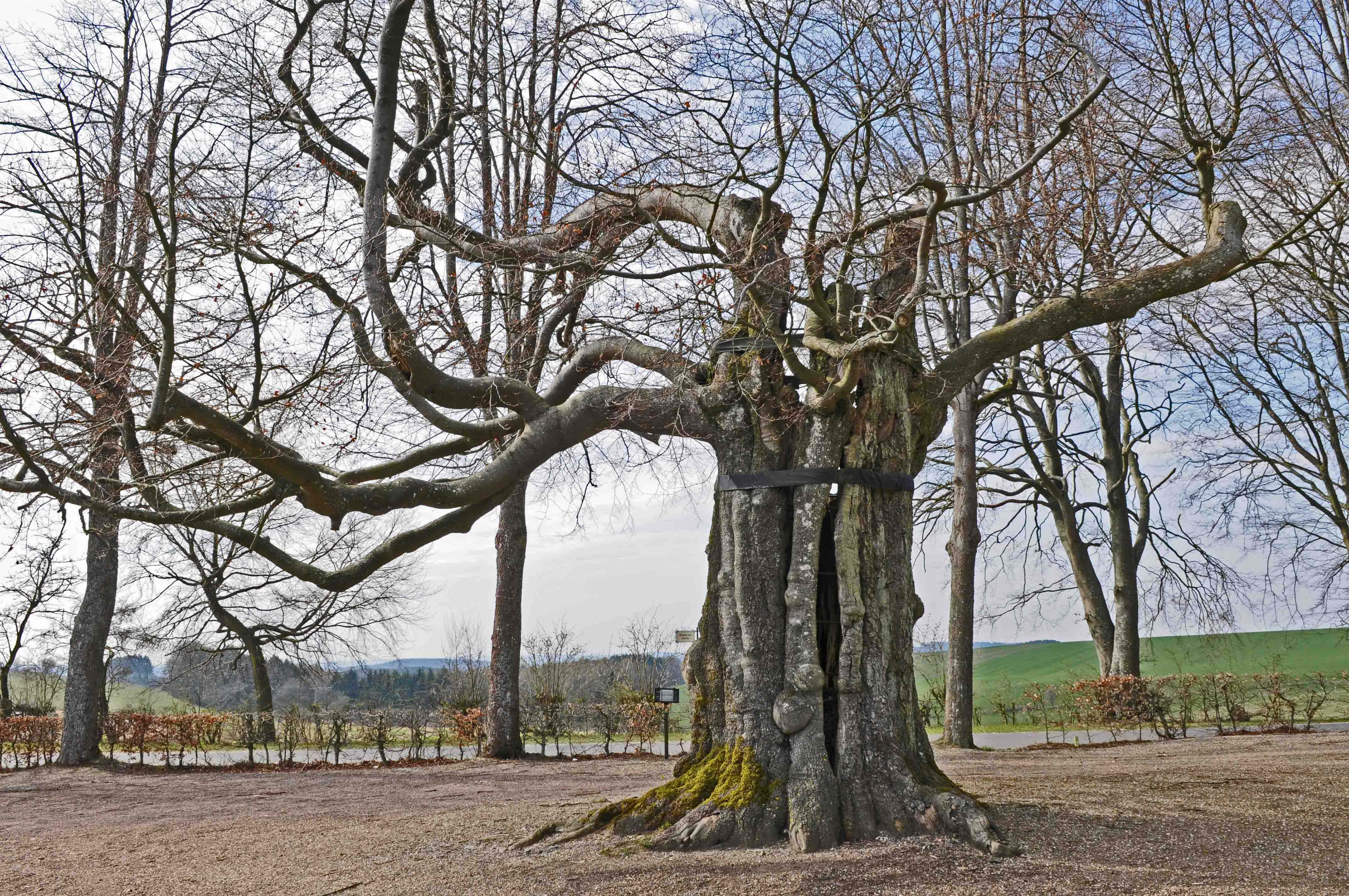 Wolframsbich op der Wolwener Klaus. Kategorie:Gemeng Rammerech + Wolwener